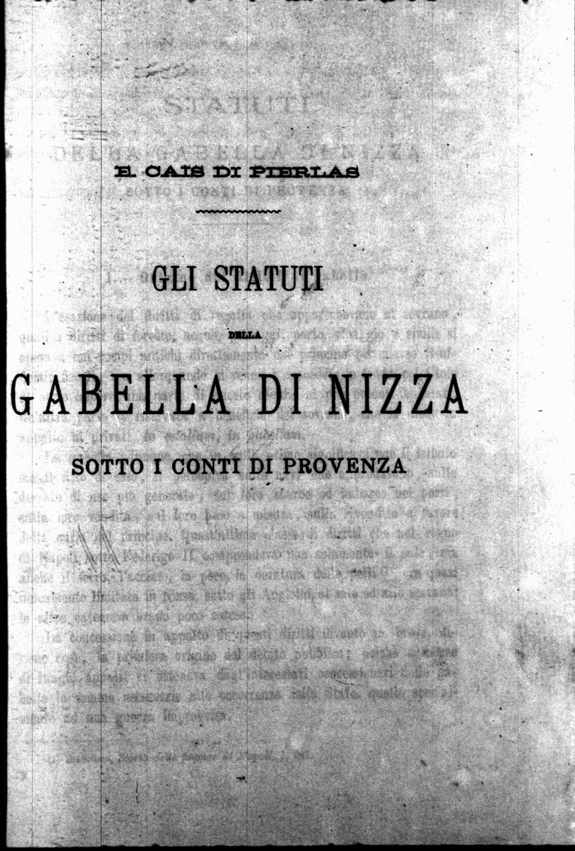 Frontespizio